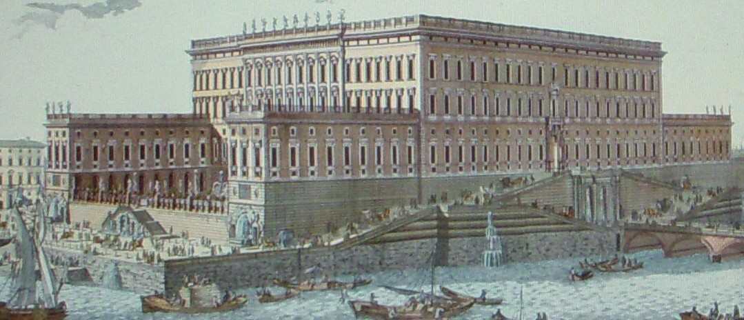 Det Kungliga slottet 1770-talet. Bild från Prospectus Arcis Stockholmensis Boream ac Orientem versus efter ett kopparstick av J.E. Rehn.